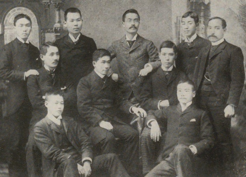 イェール大学留学生。1889年。前列右より岩崎清七、重見周吉、二列目右より湯浅吉郎、大久保利武、中島力蔵、松方幸次郎、後列右より谷邨一佐、吉田鉄太郎、小倉松夫、土屋宗一